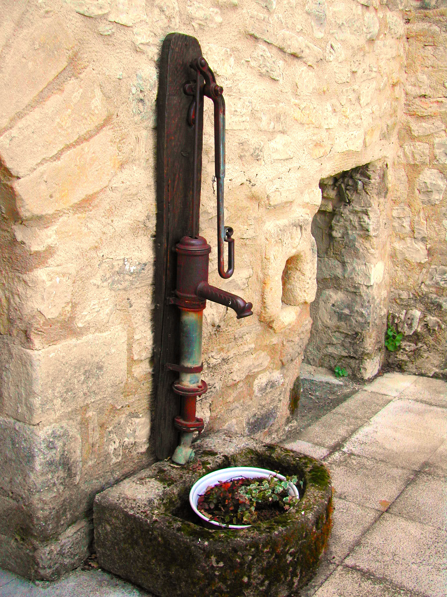 Vieille pompe à Aubenas les Alpes